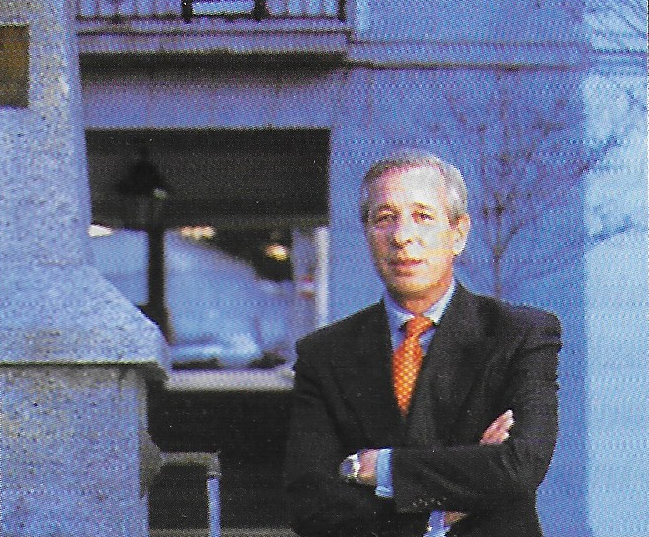 Ricardo Romero de Tejada, alcalde de Majadahonda desde 1989 hasta 2001.